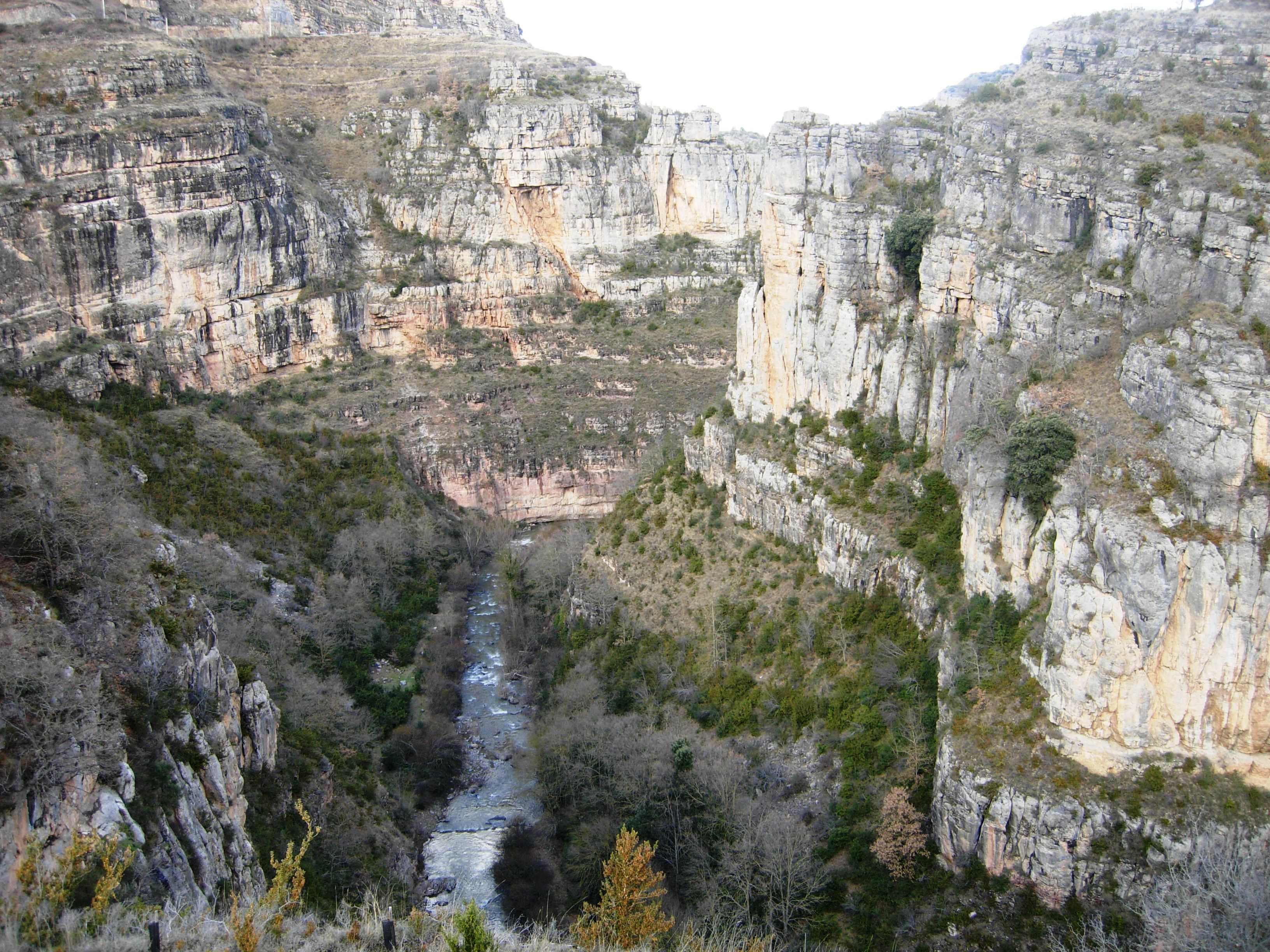 Imagen invernal de la garganta del río Leza tomada desde el sendero que conduce al mirador del cañón del río Leza, en el término municipal de Soto en Cameros (La Rioja, España)